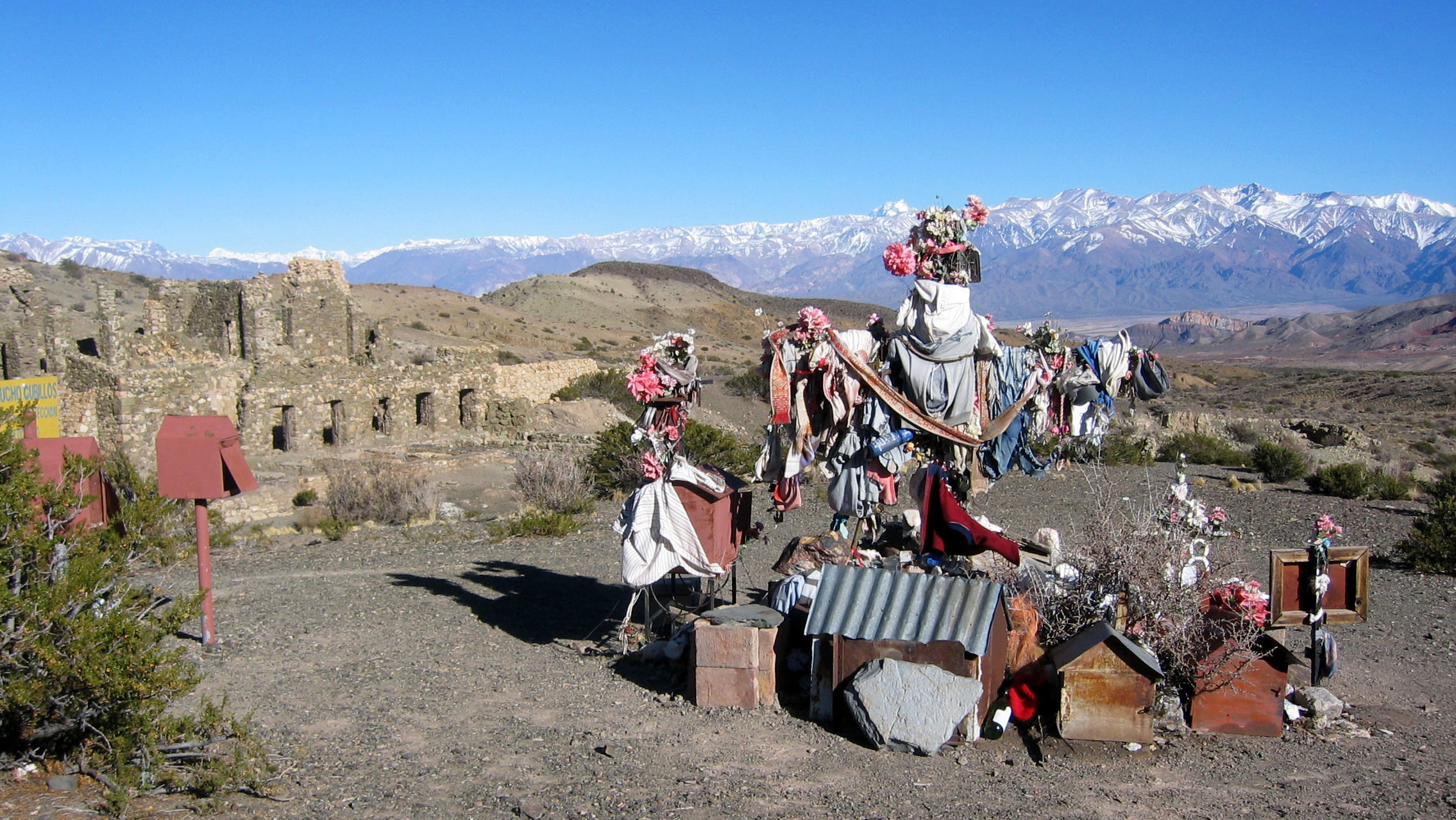 Recordatorio del Gaucho Cubillos en Paramillos de Uspallata, Mendoza